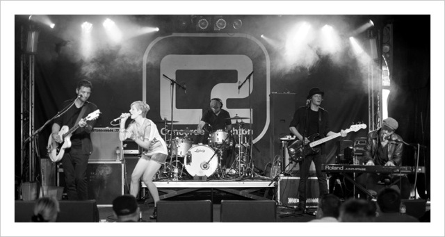 Die Kölner Band KLEE aufgenommen am 28.08.2010 in Brighton